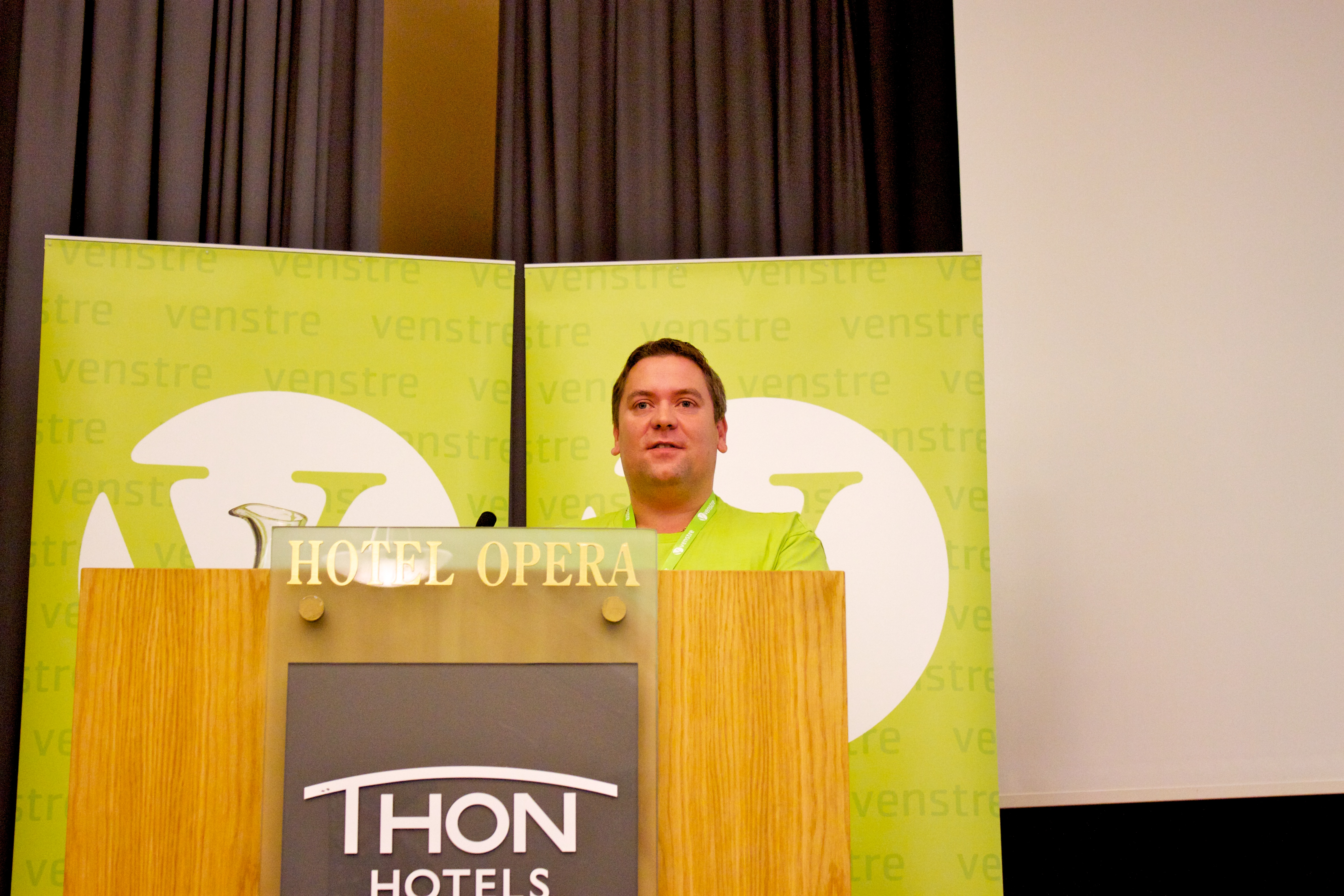 Terje Cruickshank